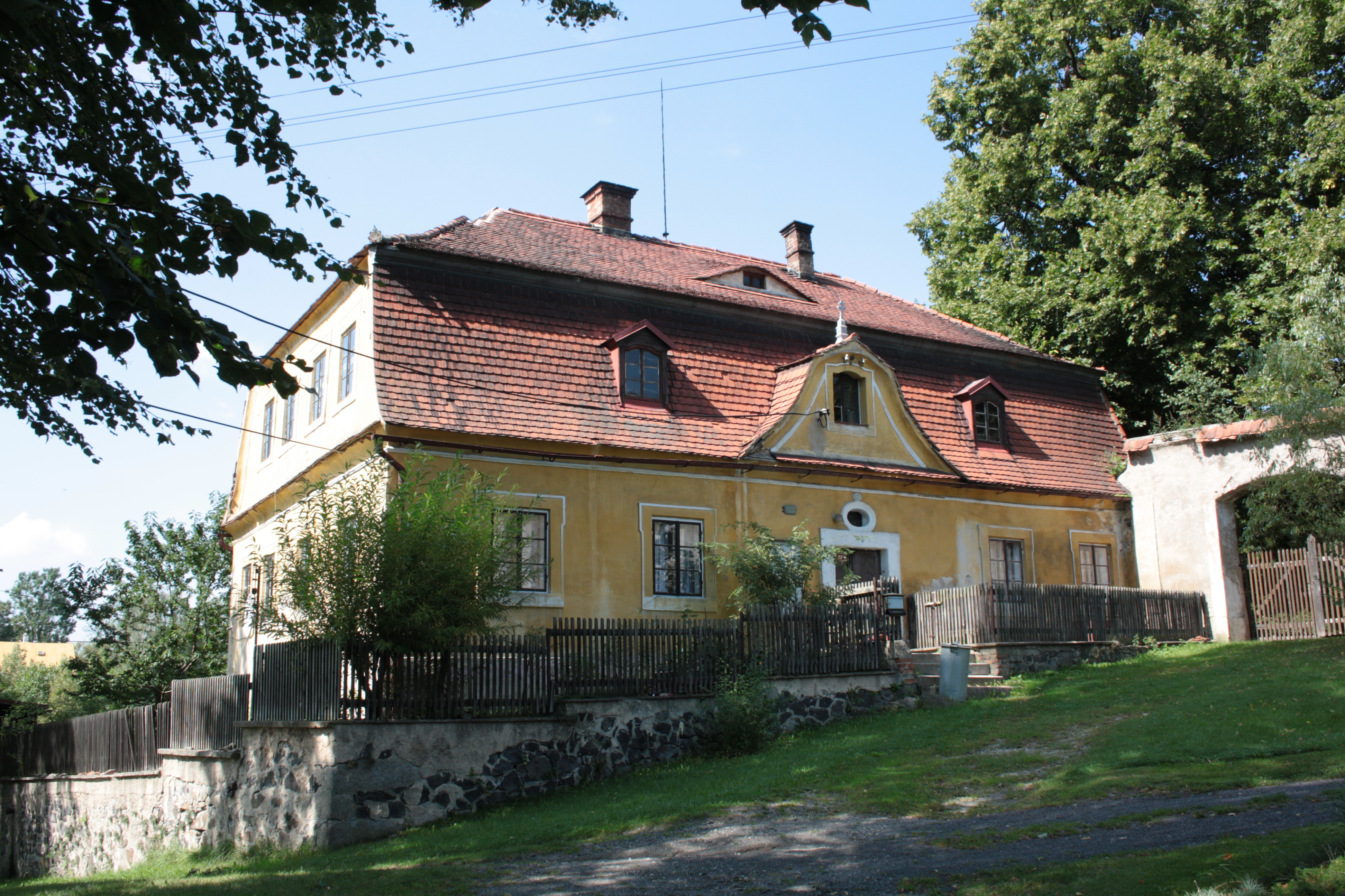 This photograph was taken with a DSLR from WMCZ's Camera grant. Fara (dům číslo popisné 117) v Krásném Lese v okrese Liberec.